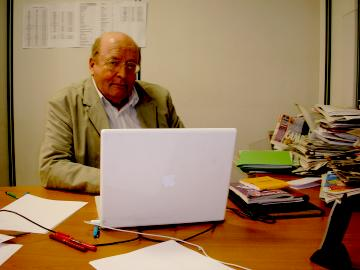 Le journaliste et écrivain Dominique Jamet dans son bureau de France Soir à Paris en mars 2007.